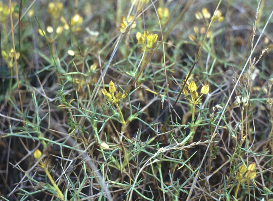 Mulinum spinosum, (Apiaceae) - Chile, Patagonien/Patagonia, Parque Nacional Torres del Paine, N Posada Río Serrano